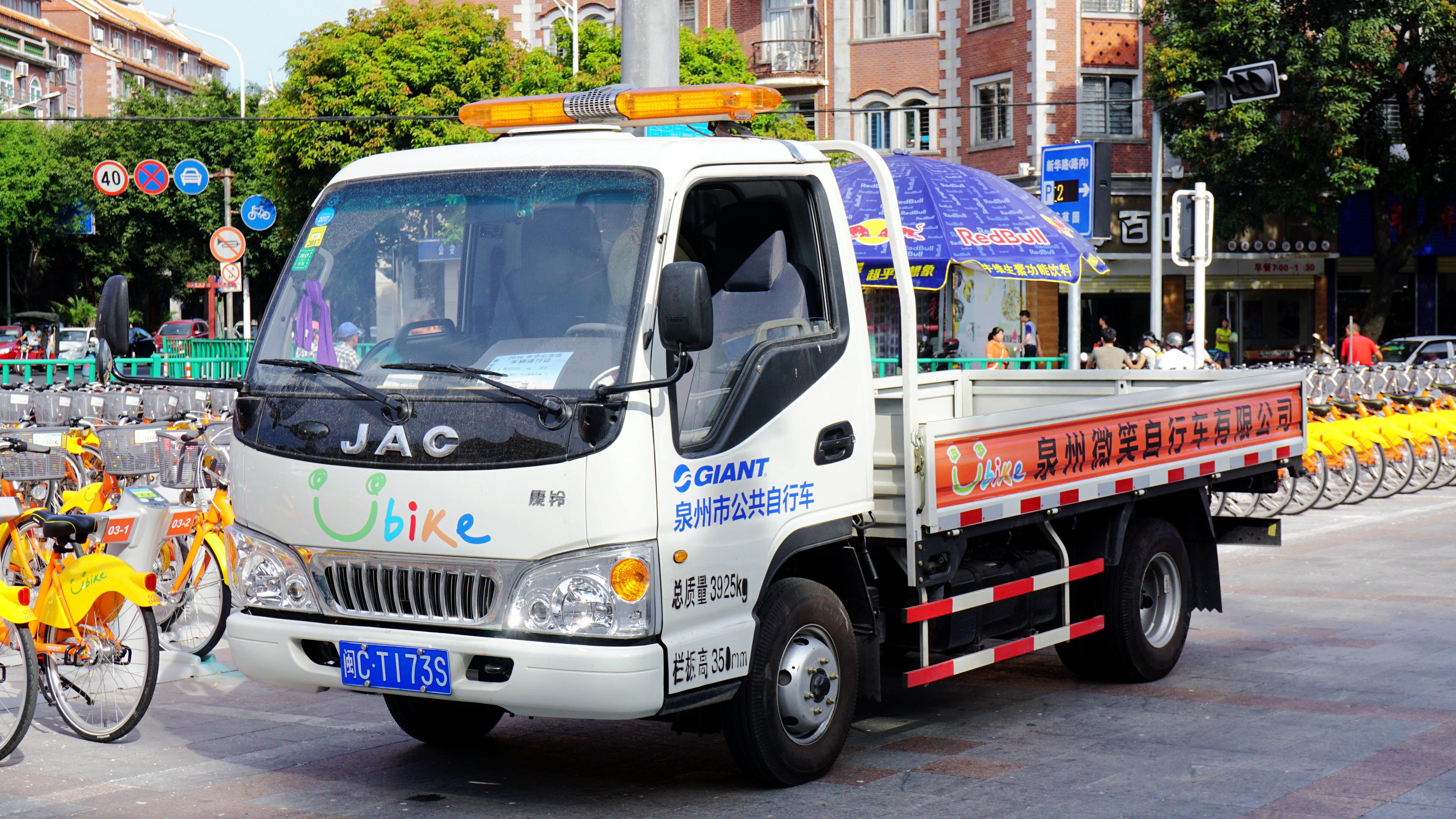 中文（中国大陆）: Youbike 调度车